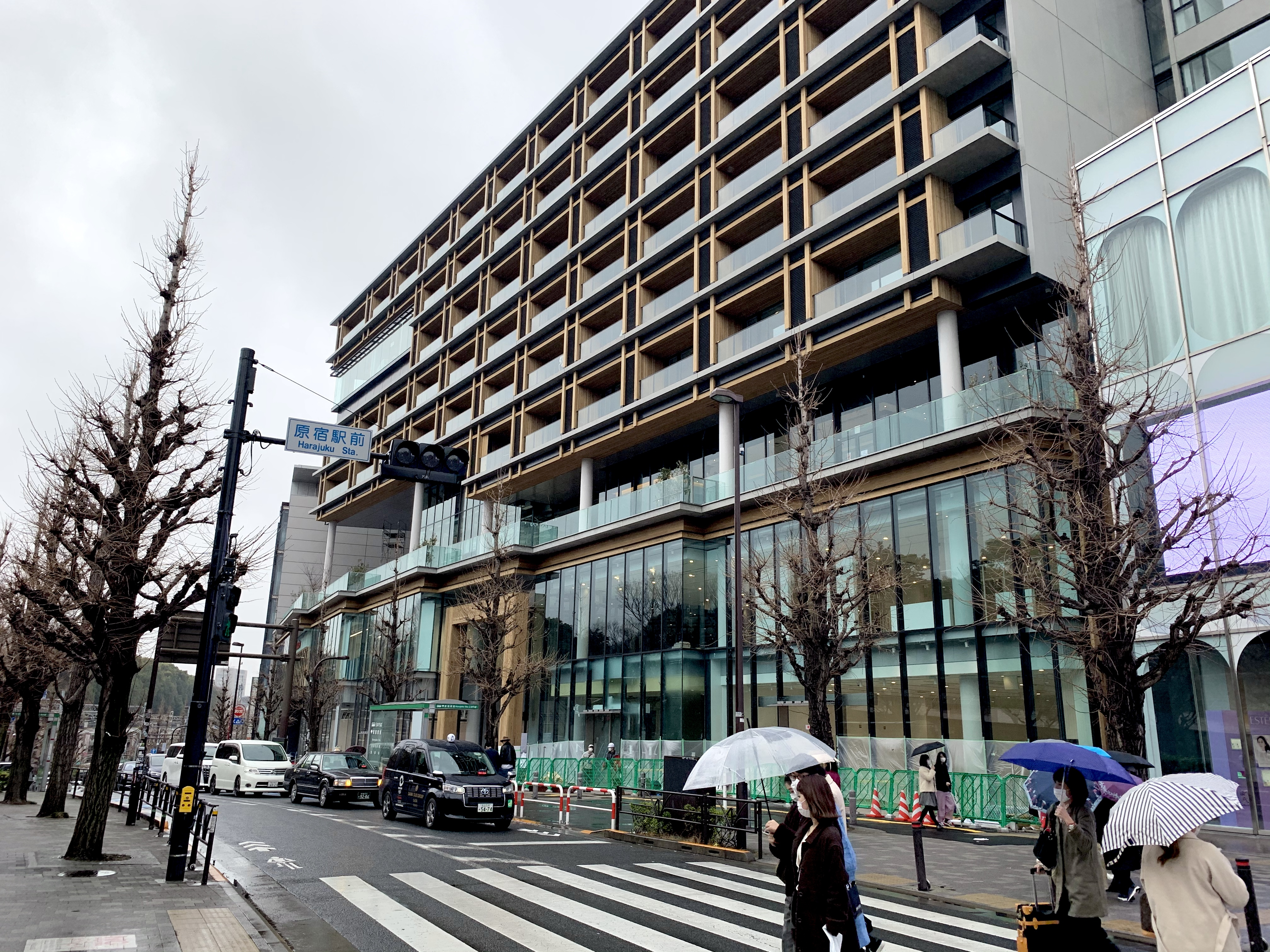 開業前のウィズ原宿を原宿駅前から撮影